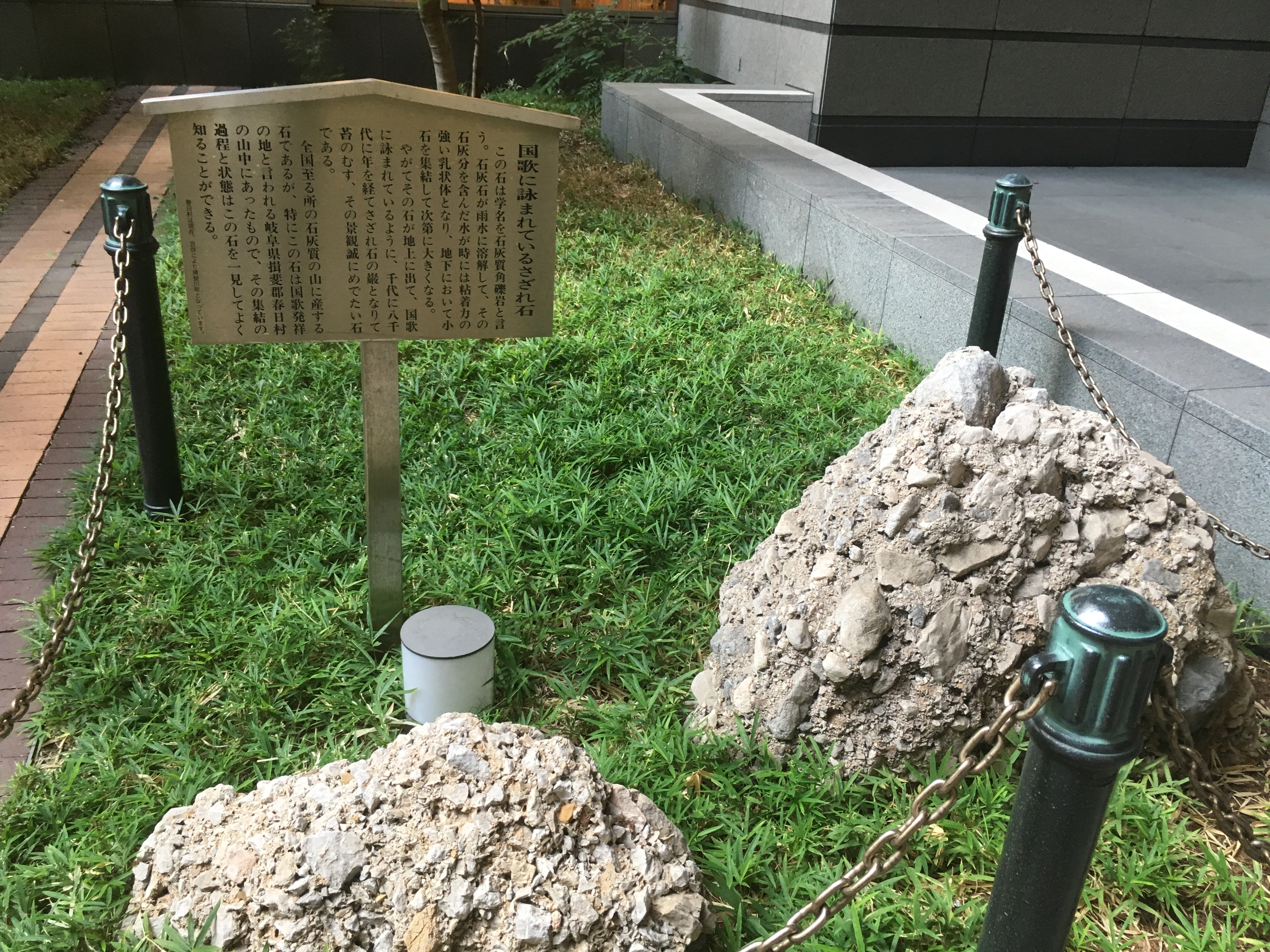 文科省敷地内にあるさざれ石